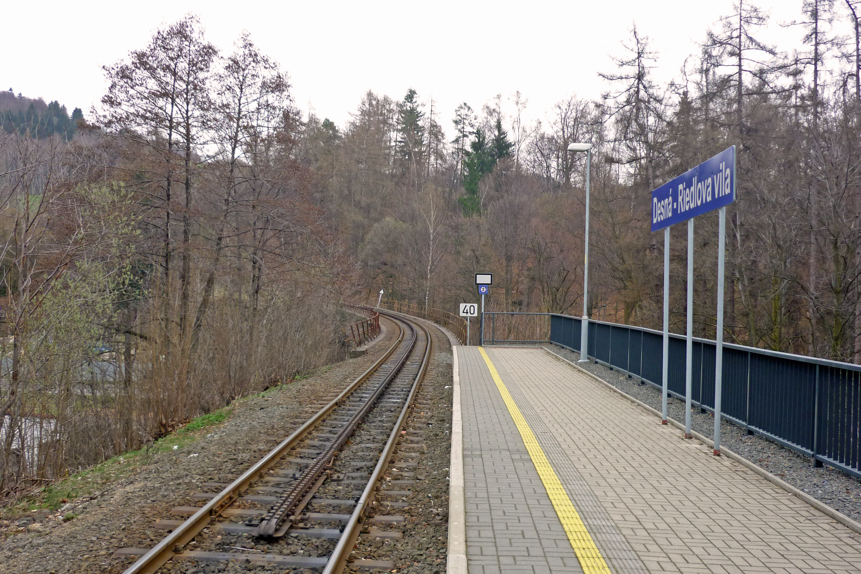 Zahnstange (System Abt) an der Station (Desná-Riedlova vila) der Eisenbahnstrecke Tanvald–Kořenov (Tannwald–Wurzelsdorf)